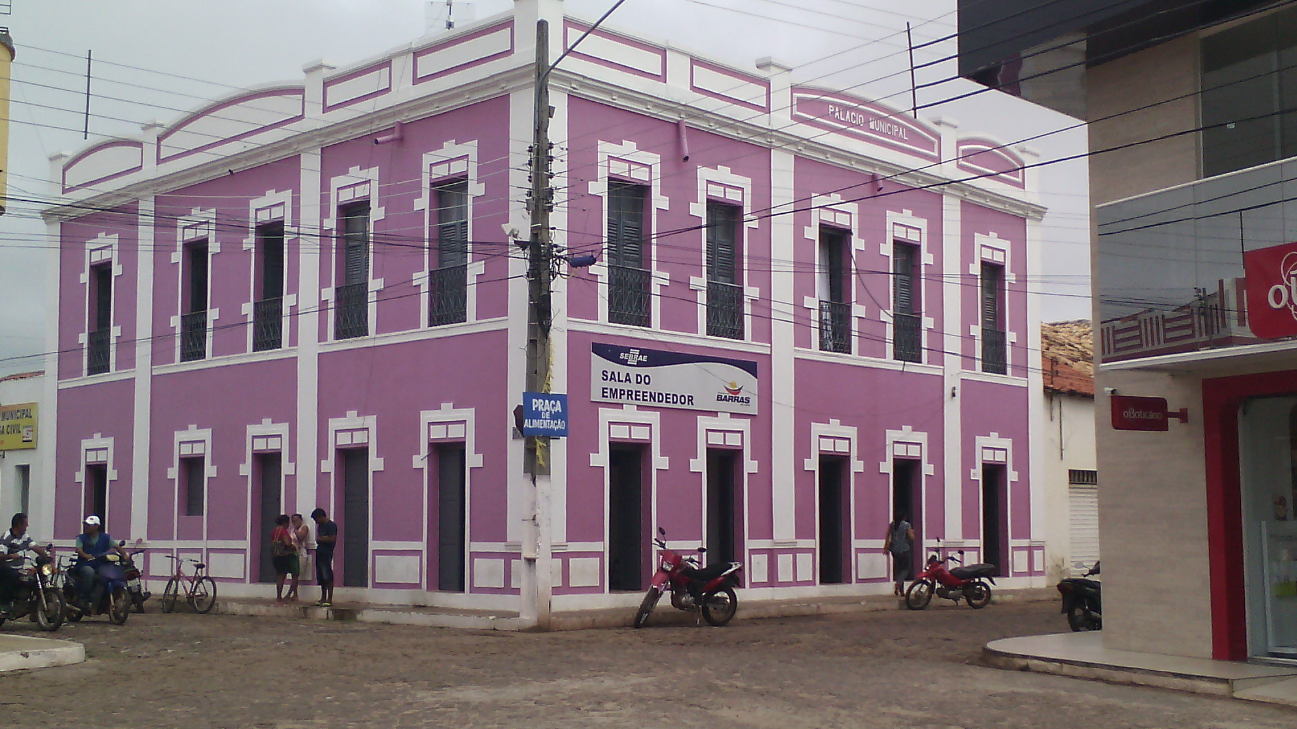 Palácio onde funciona a Biblioteca pública municipal Davi Caldas em Barras-PI